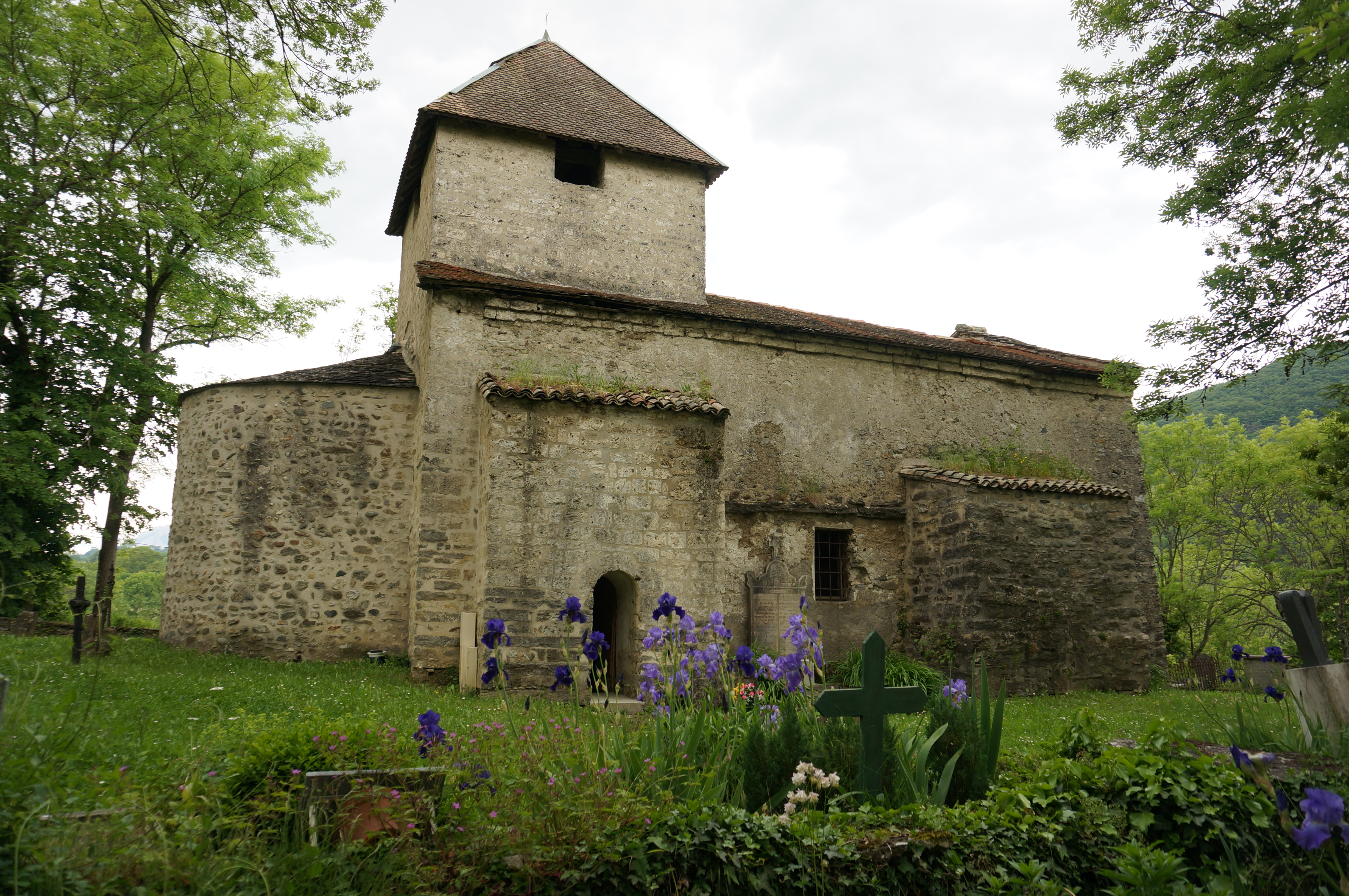 Chapelle Saint-Christophe de Pâquier à Saint-Martin-de-la-Cluze